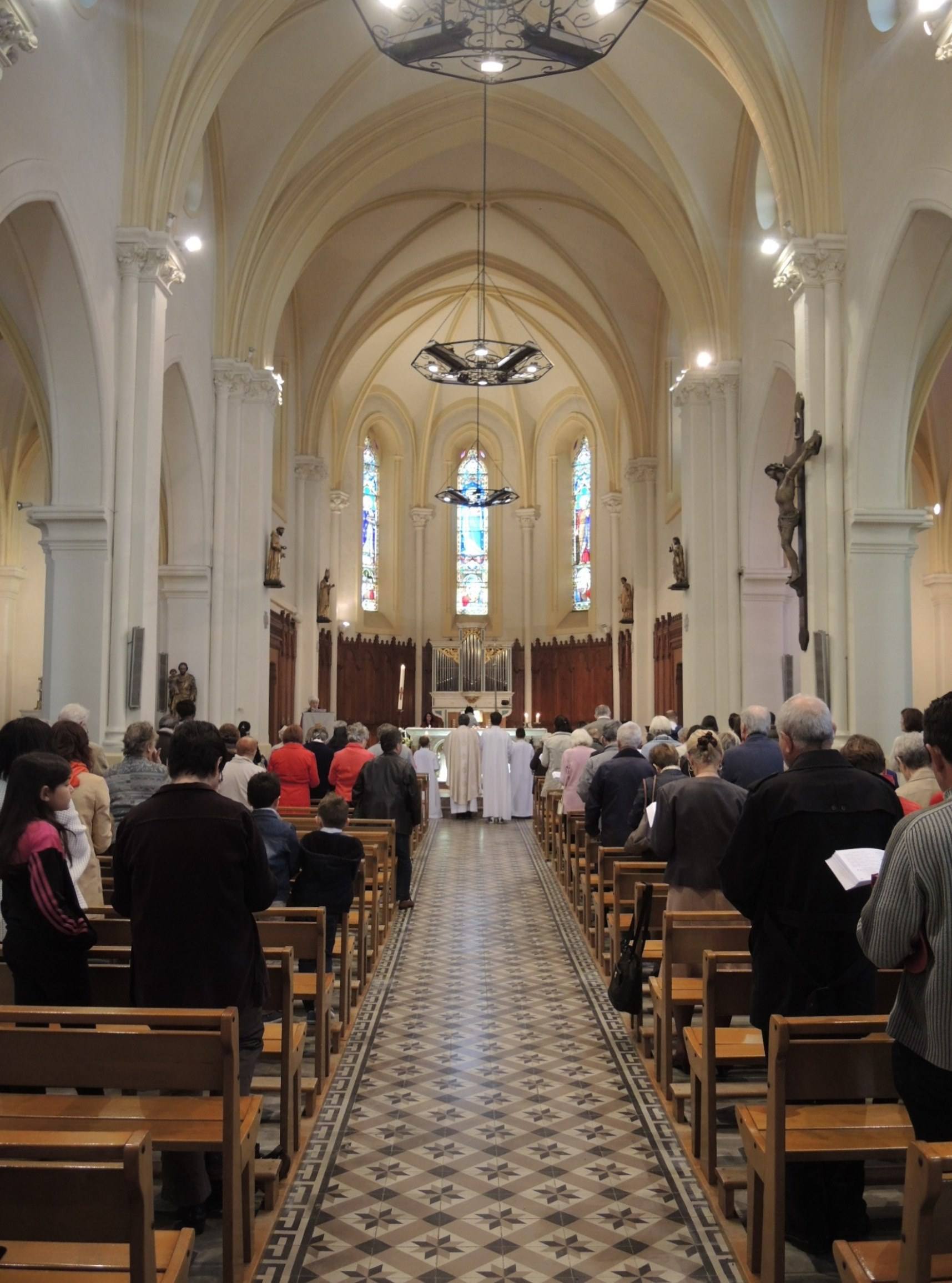 Serrières (Ardèche) détail